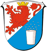 Wappen von Bad Zwesten